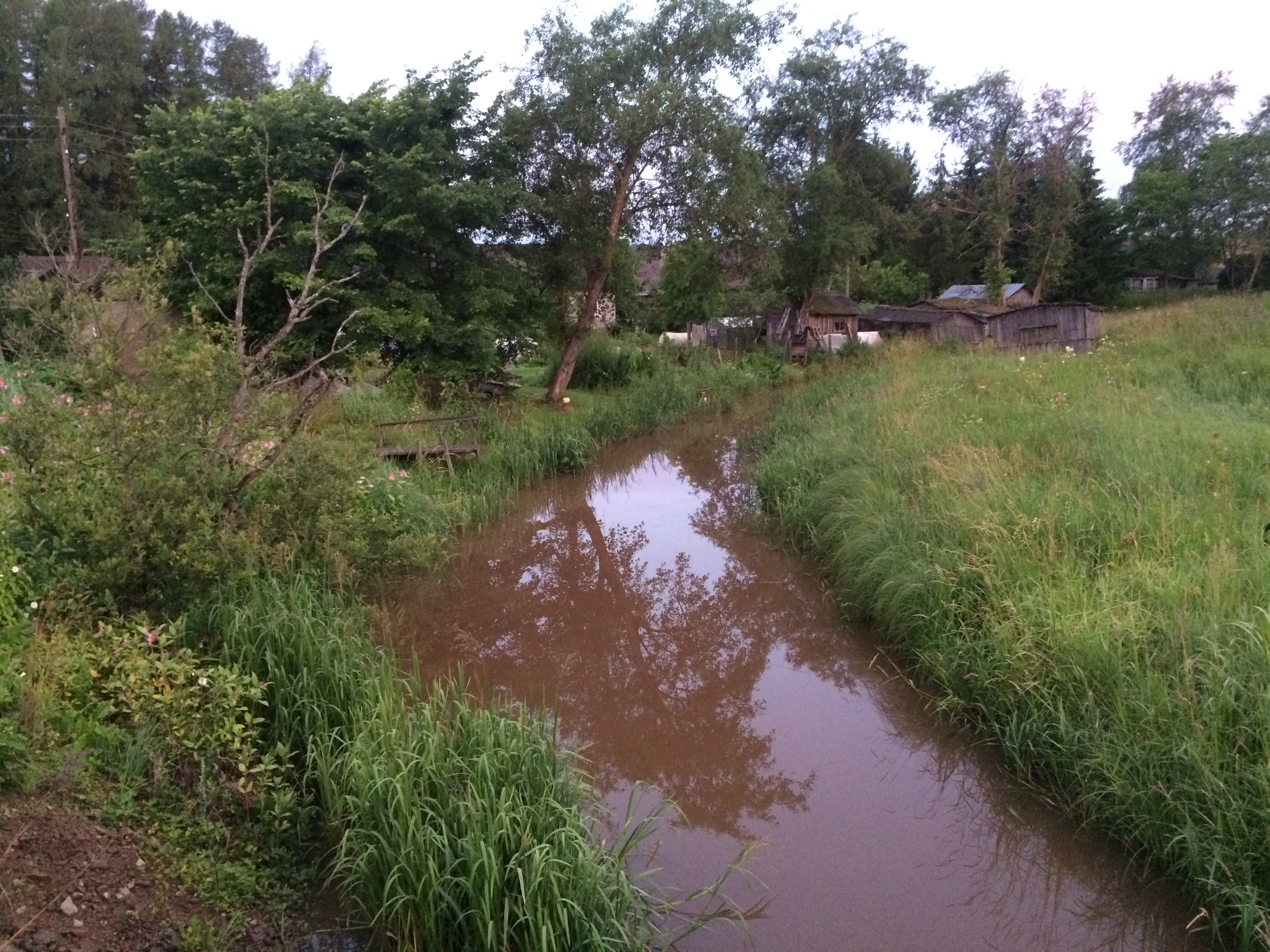 Вонкаоя